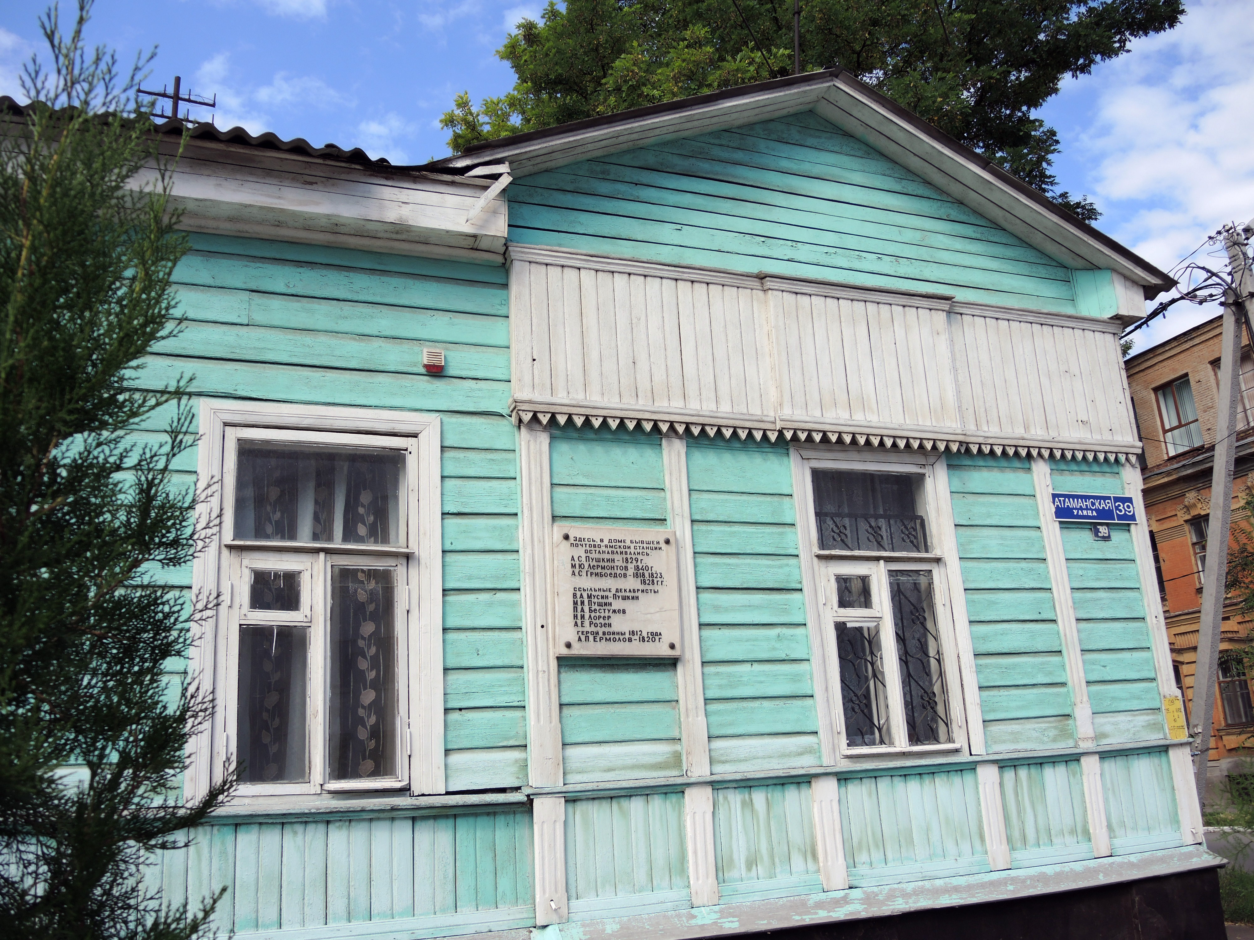 Здание почтовой станции, здесь останавливались А.С. Пушкин и М.Ю. Лермонтов: улица Советская, 39, Новочеркасск, Ростовская область